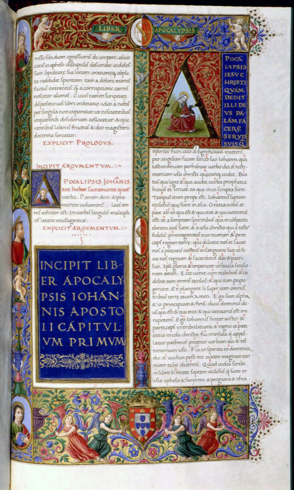 Bíblia dos Jerónimos, página do Vol. VII